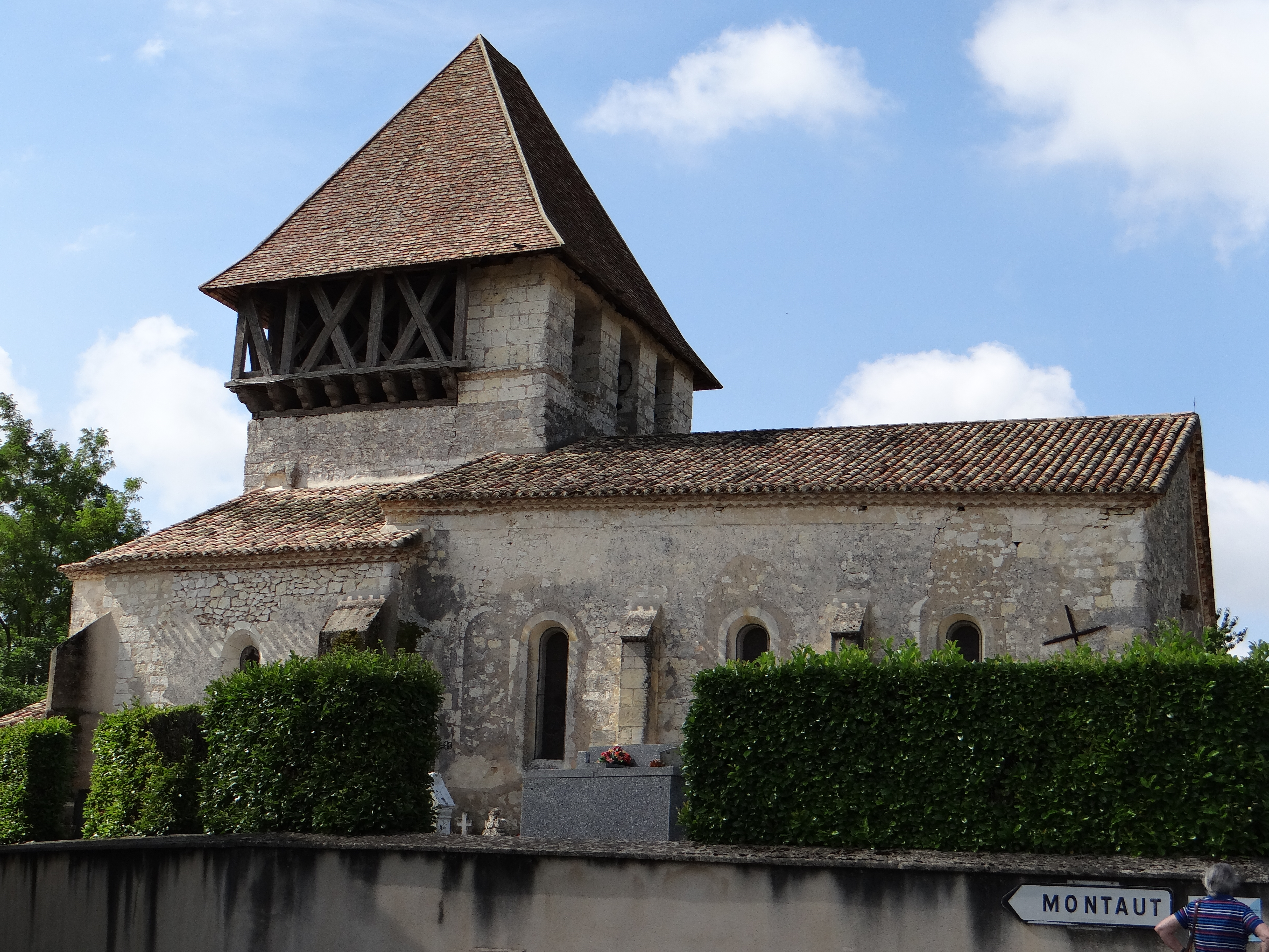 Bournel - Église Sainte-Madeleine - Côté nord